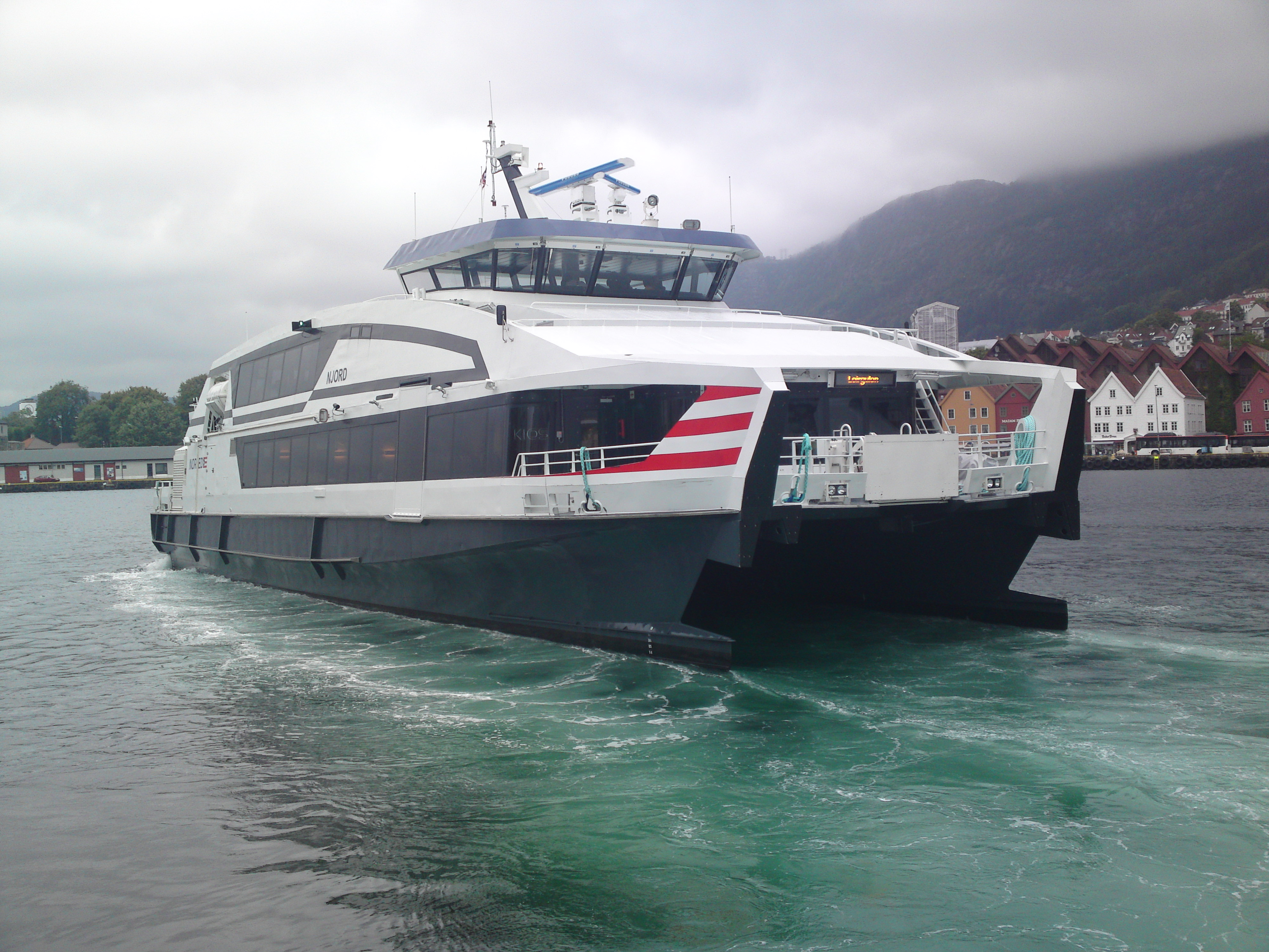 Njord i Bergen hausten 2012